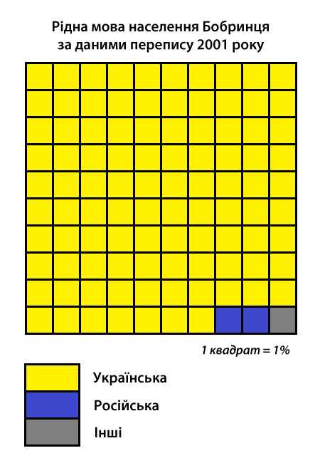 Інфографіка розподілу населення міста Бобринець за рідною мовою згідно з даними перепису 2001 року. Джерело: Розподіл населення Кіровоградської області за рідною мовою (у % до загальної чисельності населення) за переписом 2001 року